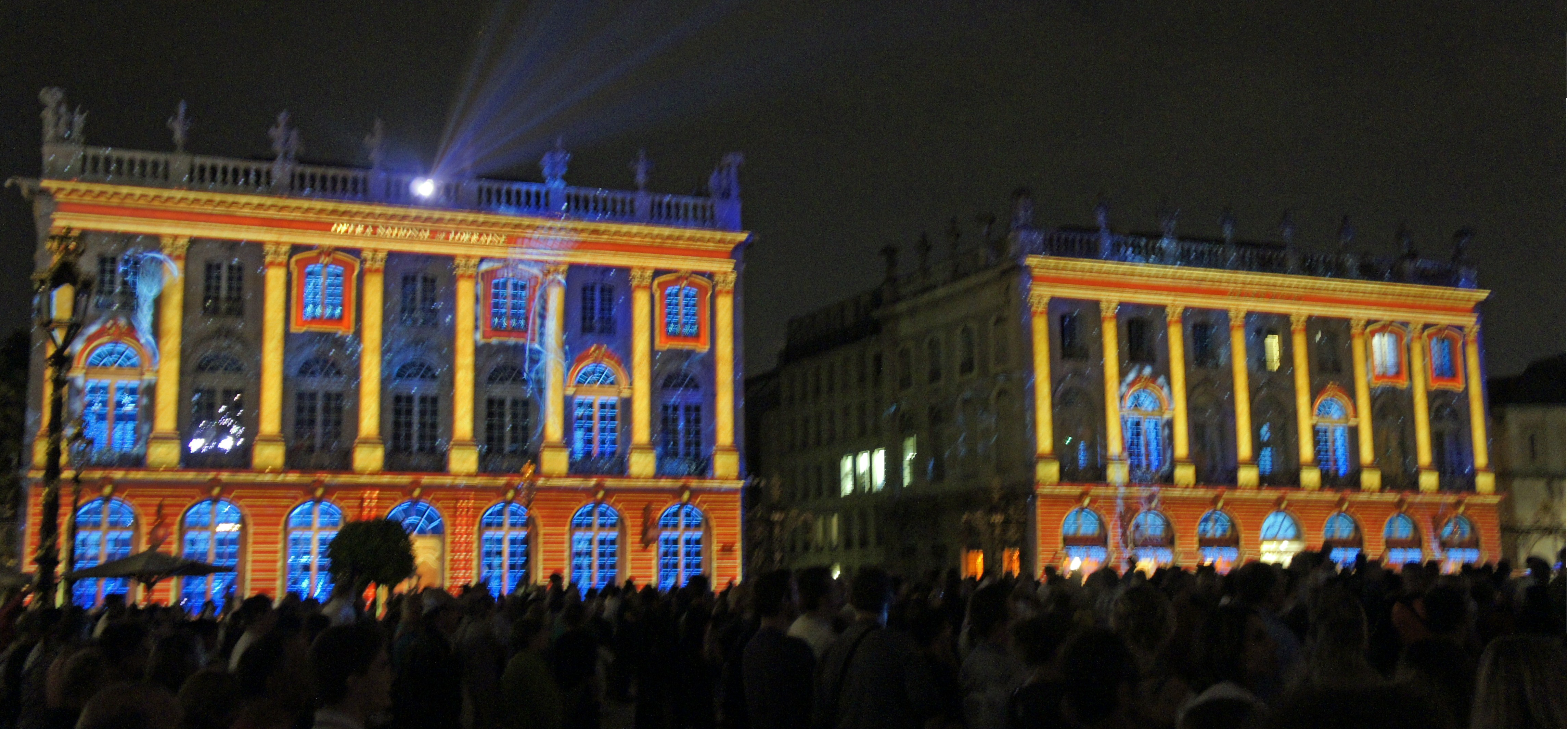 Spectalce Rendez-vous place Stanislas en 2012.